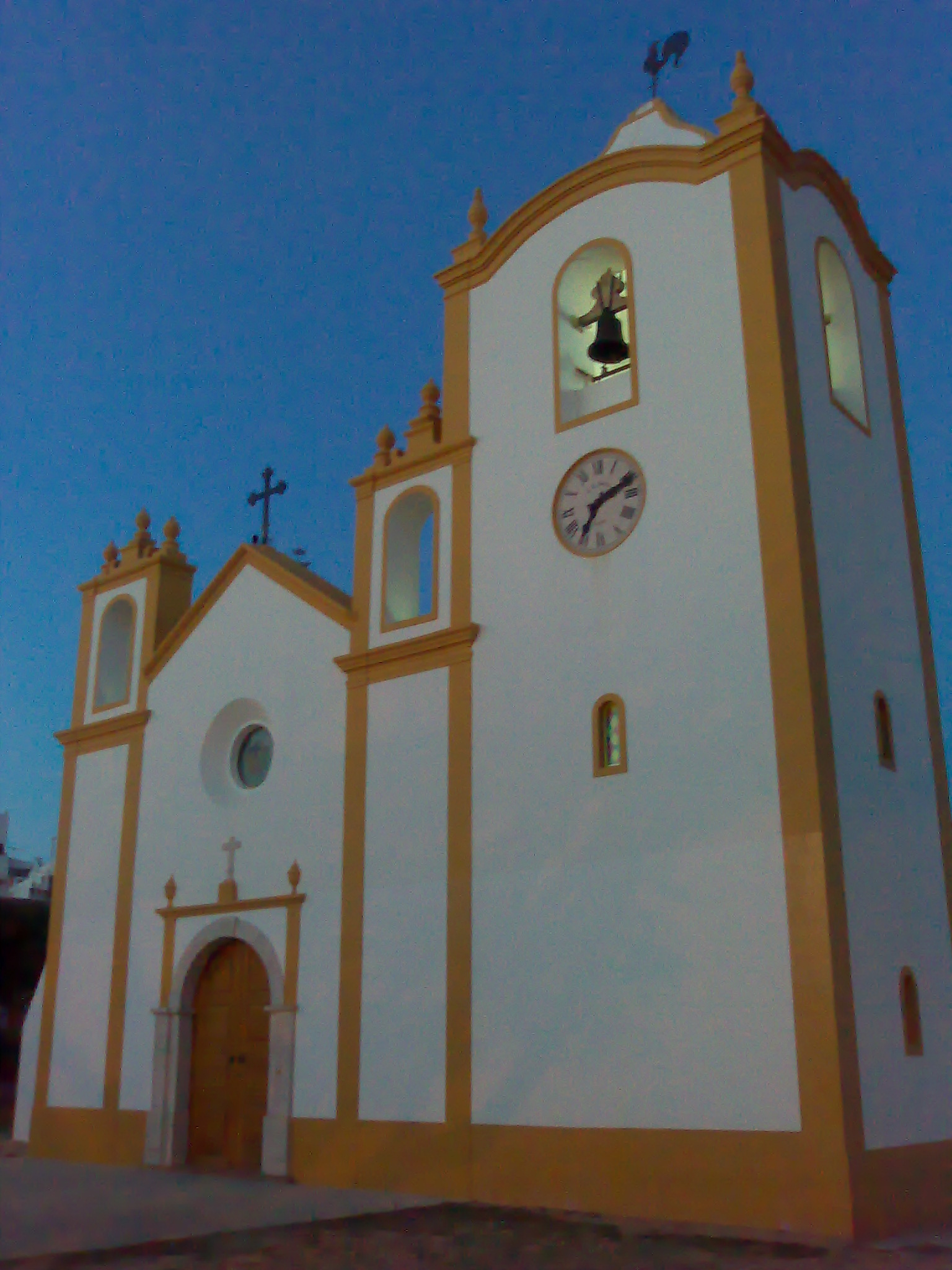 Igreja da luz, Luz, Lagos, Portugal